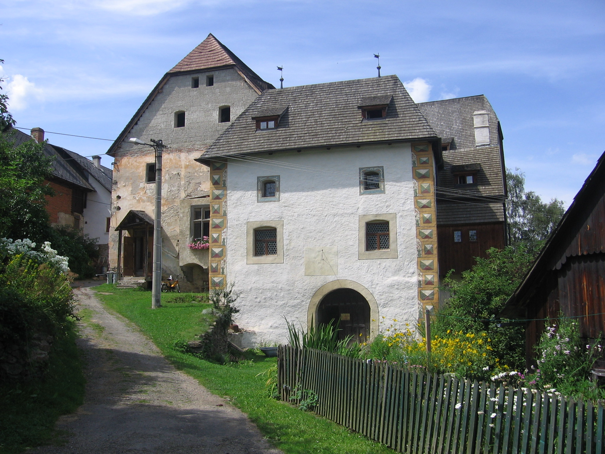 Tvrz Drslavice, okr. Prachatice